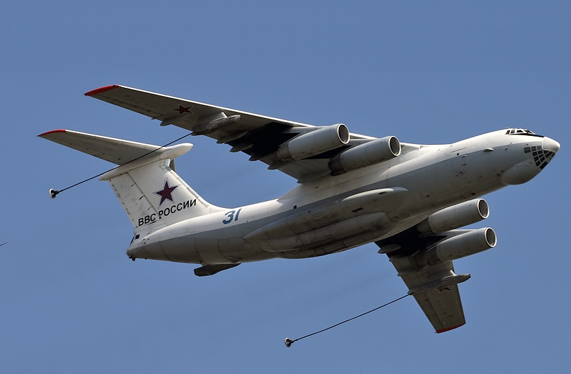 Ilyushin Il-78M (31 blue)